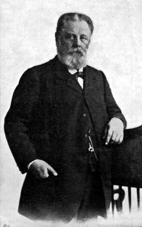 Mechwart András (1834–1907) mérnök portréja. Strelisky felvétele